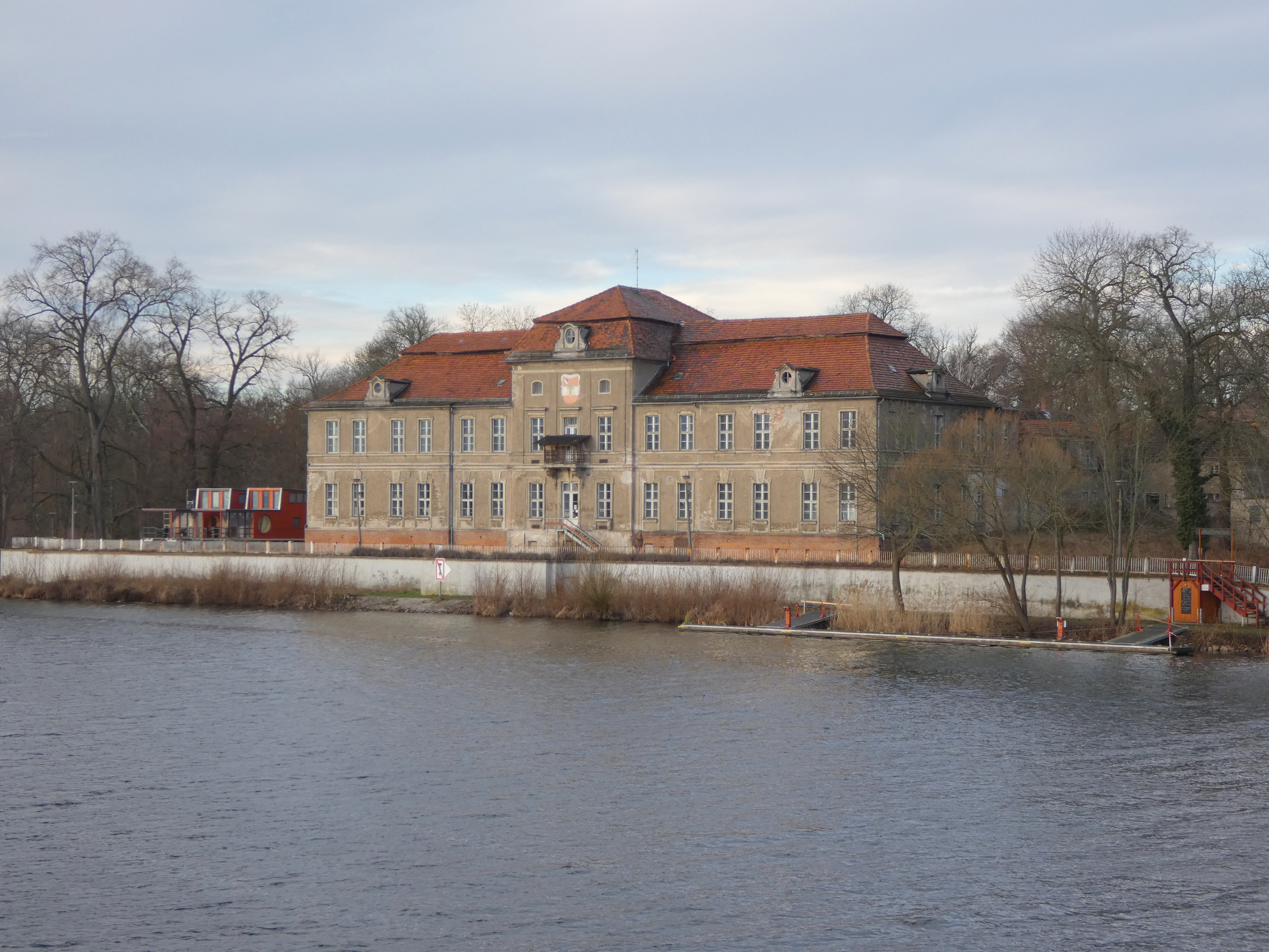 Schloss Plaue Flussseite